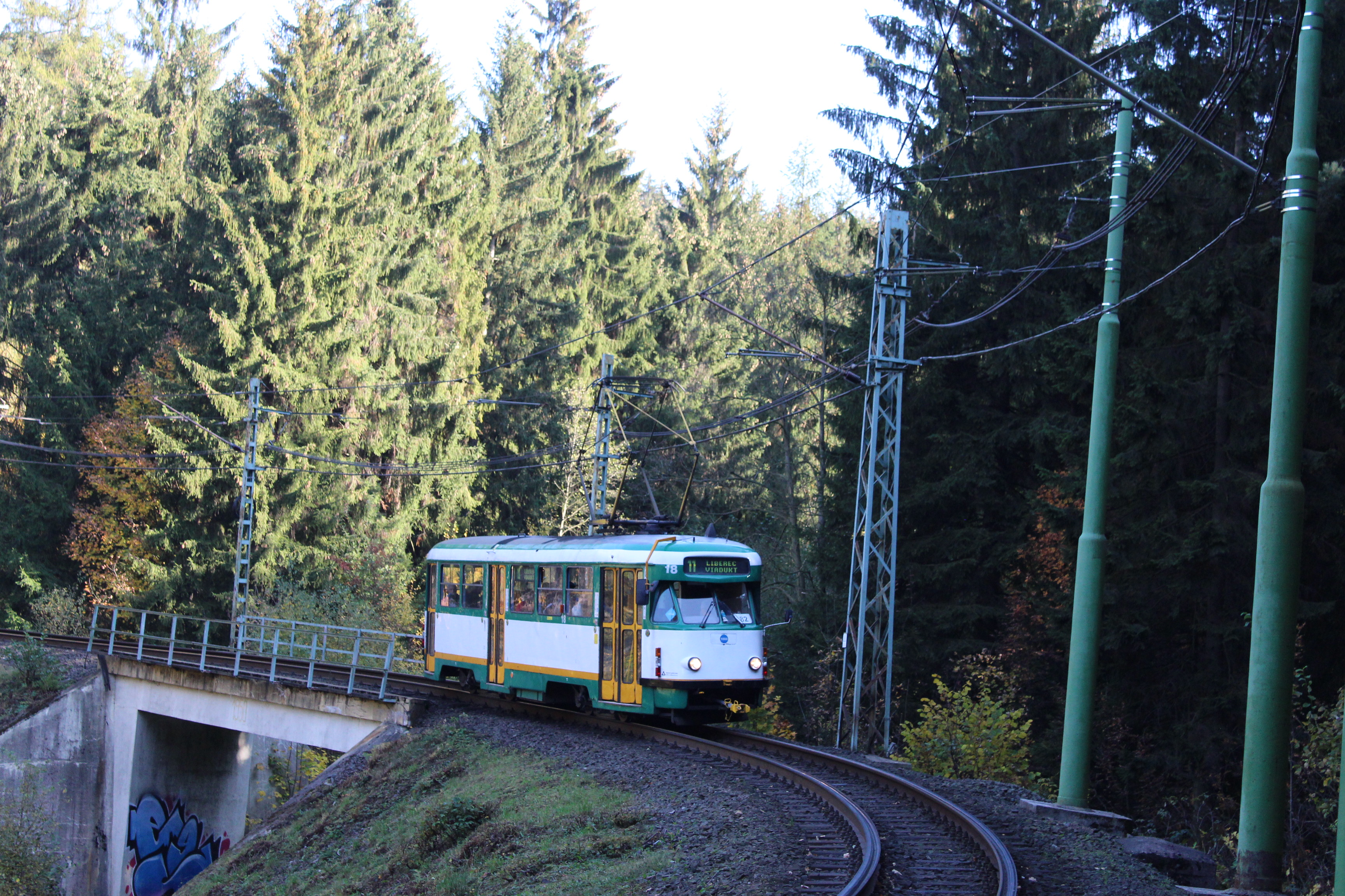 Tatra T2R ev. č. 18 na meziměstské tramvajové trati Liberec–Jablonec n. N.